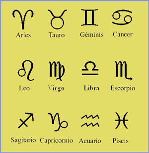 signos zoadiacales